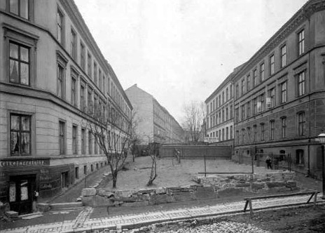 Kvartalet mellom Egedes- og Oslo gate